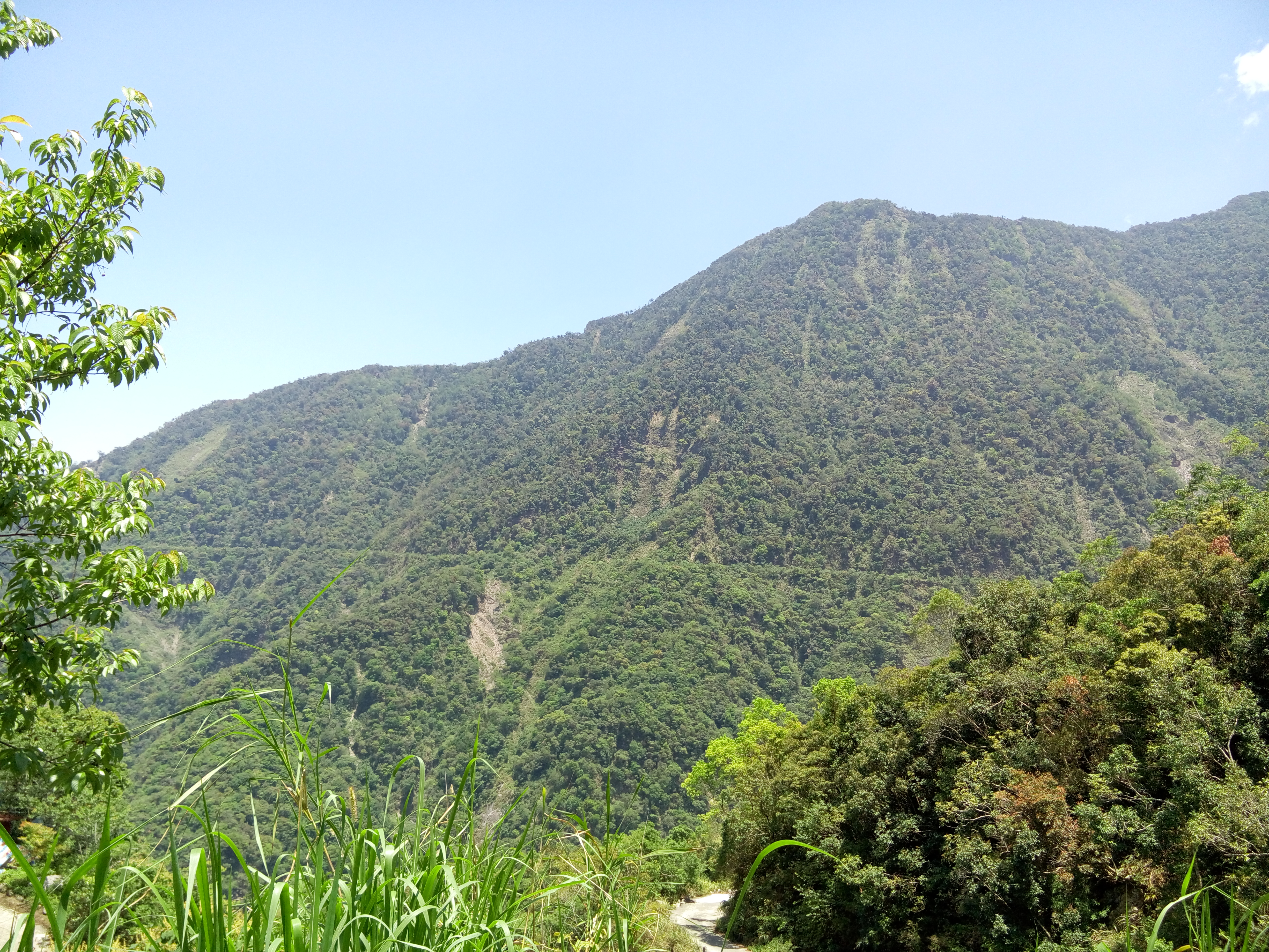 中文（台灣）: 屏東縣霧台鄉阿禮部落小鬼湖林道